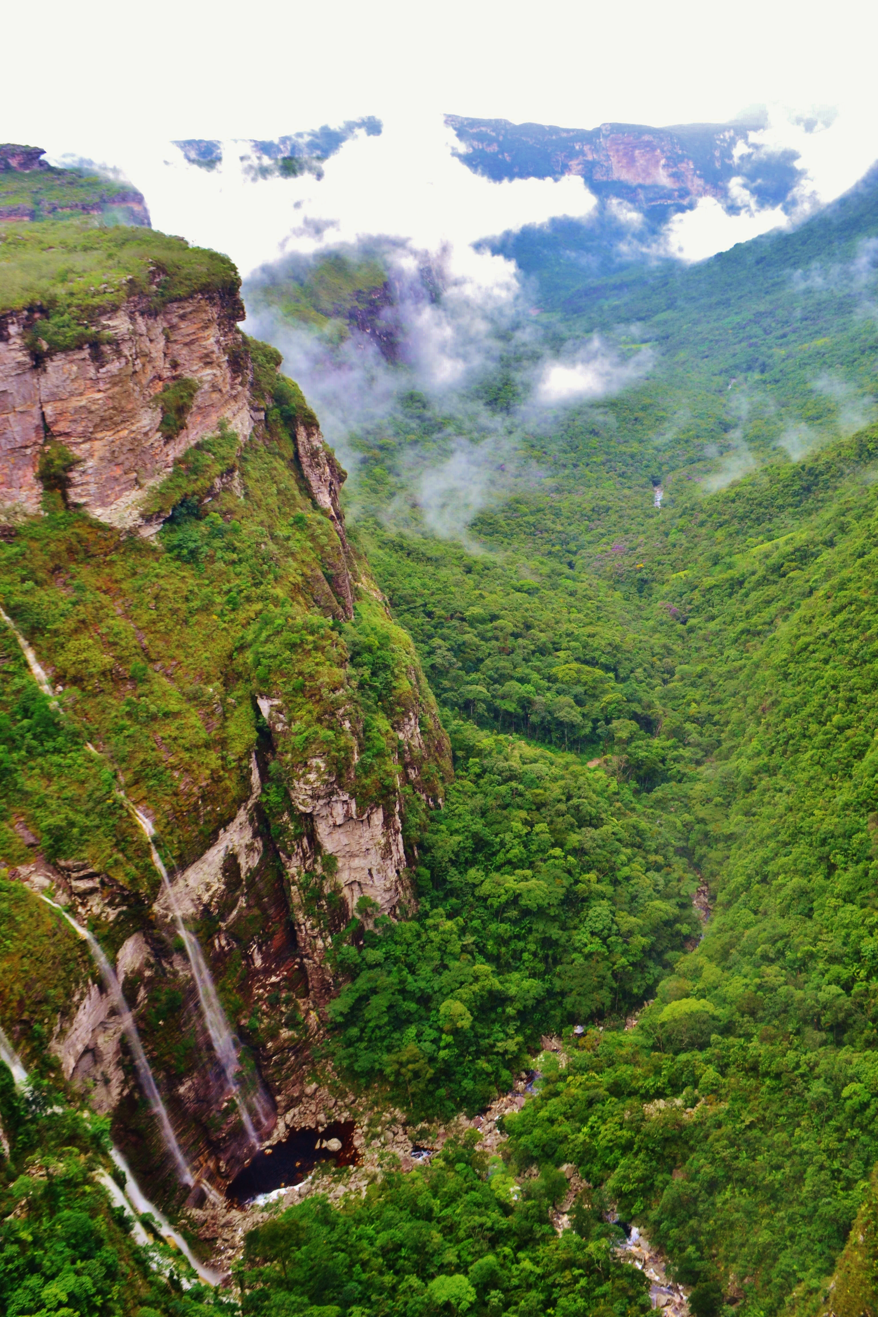 Uma das mais belas cachoeiras da Chapada Diamantina.